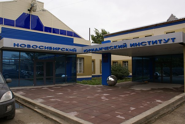 2 Корпус НЮИ (ф) ТГУ по адресу: г. Новосибирск, ул. Широкая, д. 33